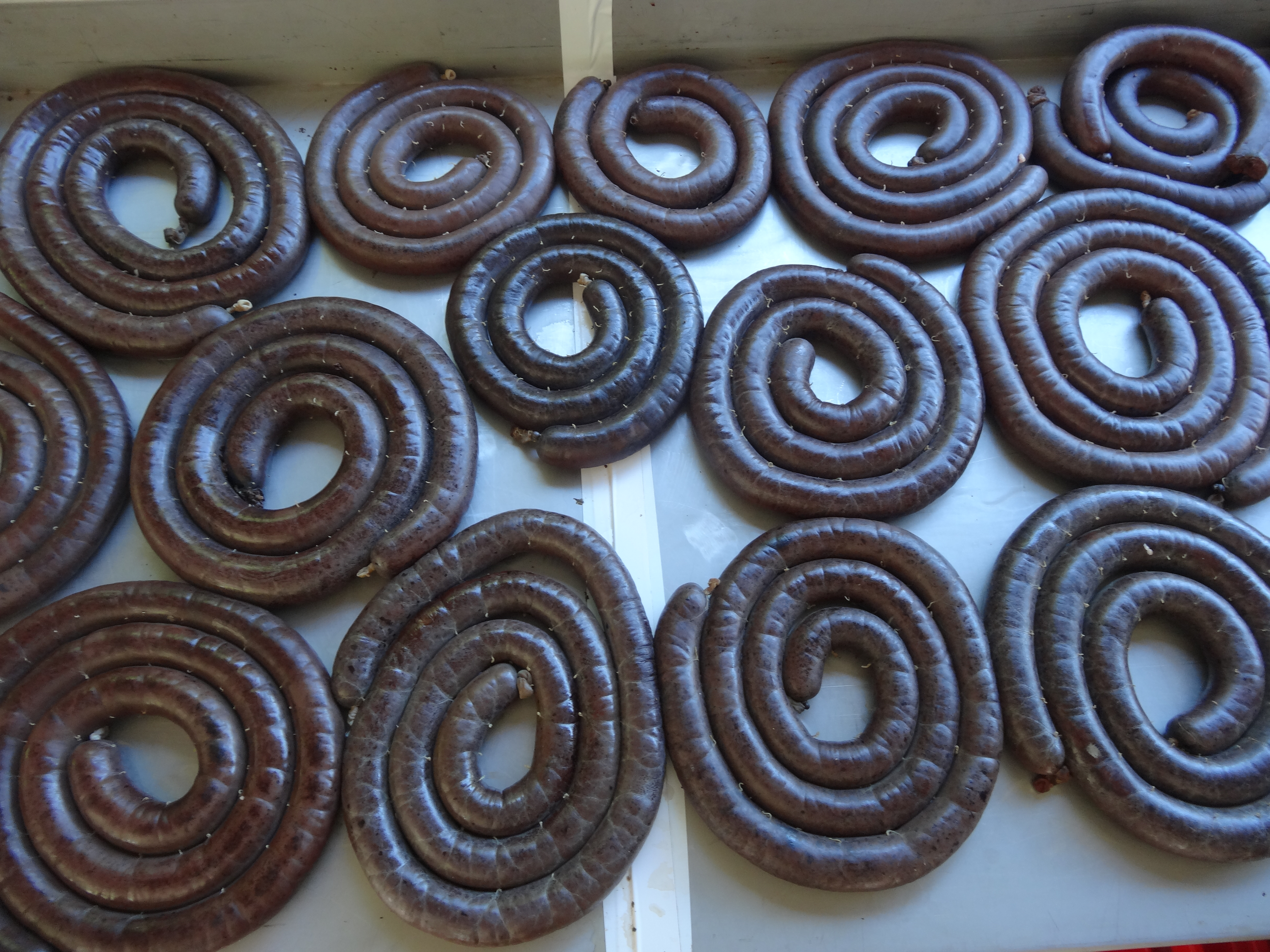 Vue de la fête du Boudin de Conand